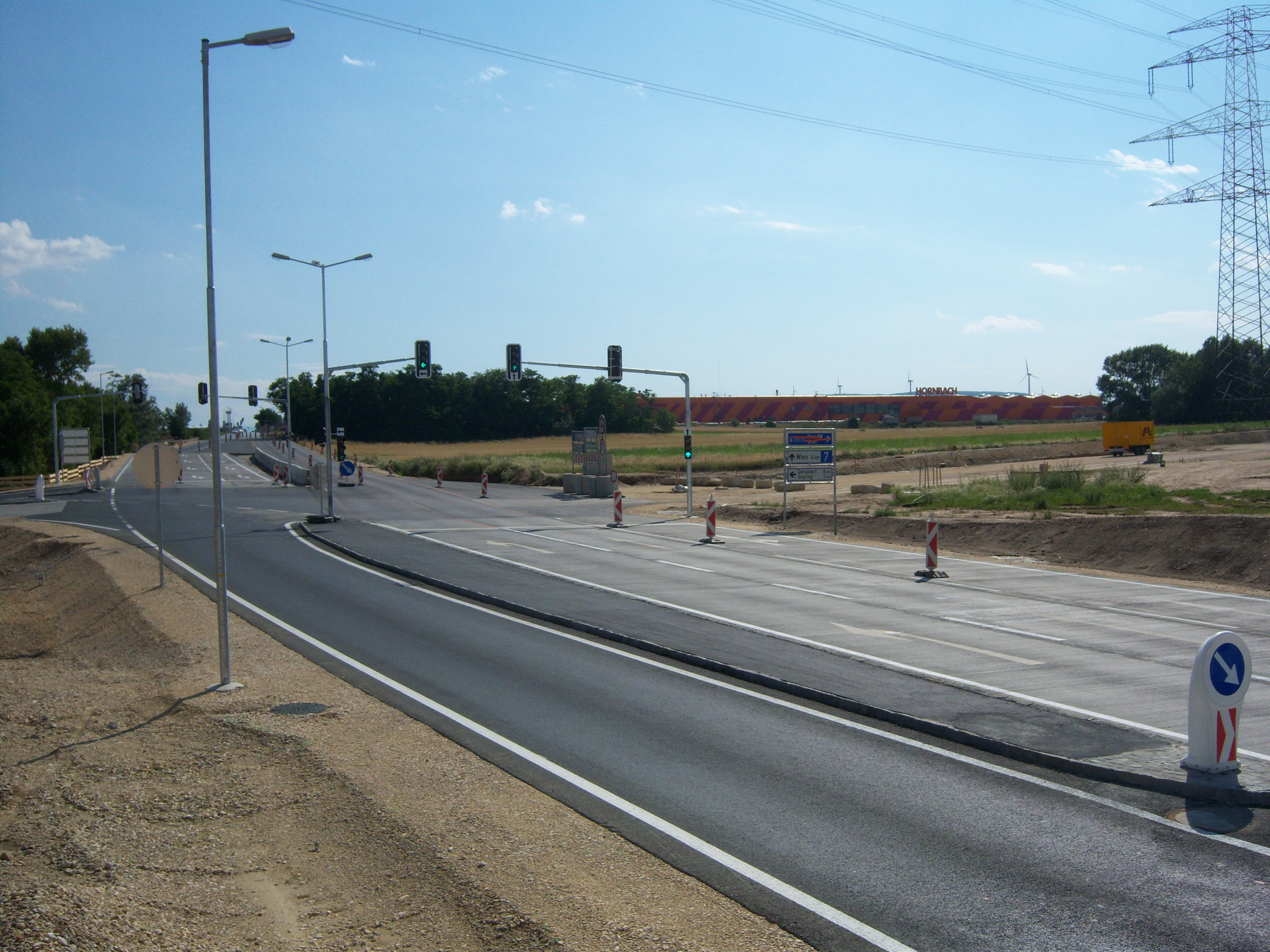 neue B7 Richtung Wien beim Knoten Eibesbrun